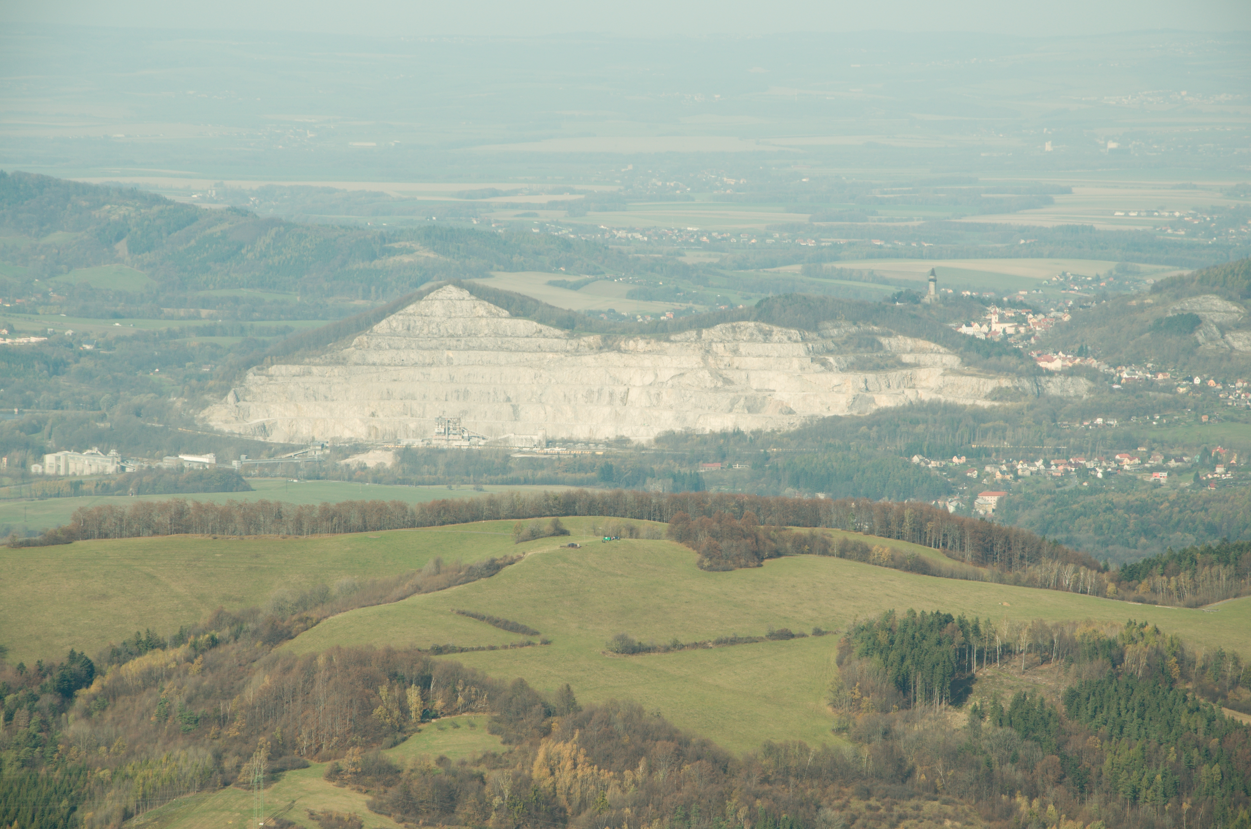 Kotouc z Velkeho Javorniku